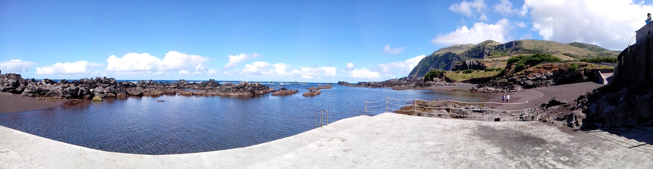 Praia de Vila Nova do Corvo, ilha do Corvo, Açores, Arquivo de Villa Maria, ilha Terceira, Açores